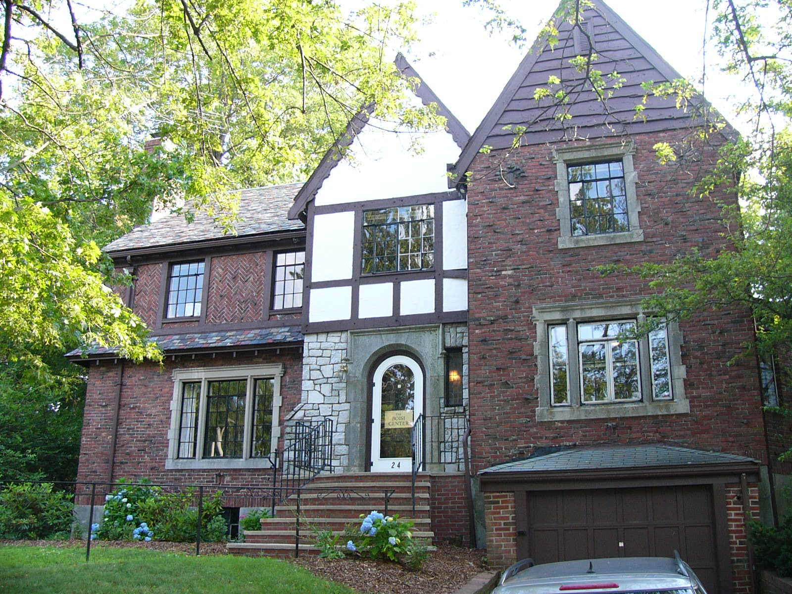 Boisi Center, Boston College